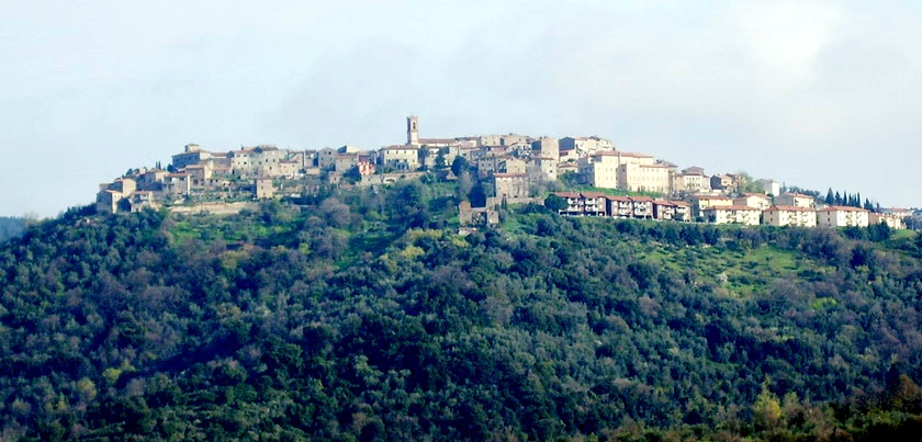 Panorama di Civitella Marittima (GR)